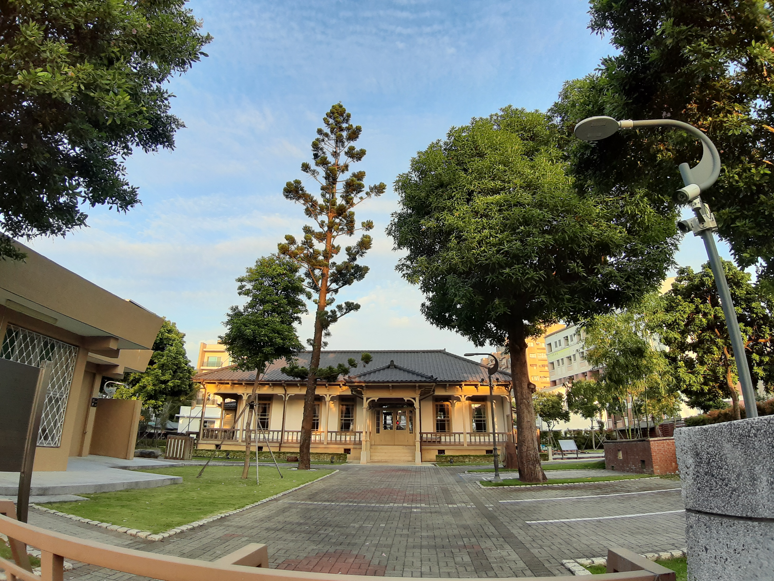 原臺南廳長官邸 臺南市東區育樂街197巷2號